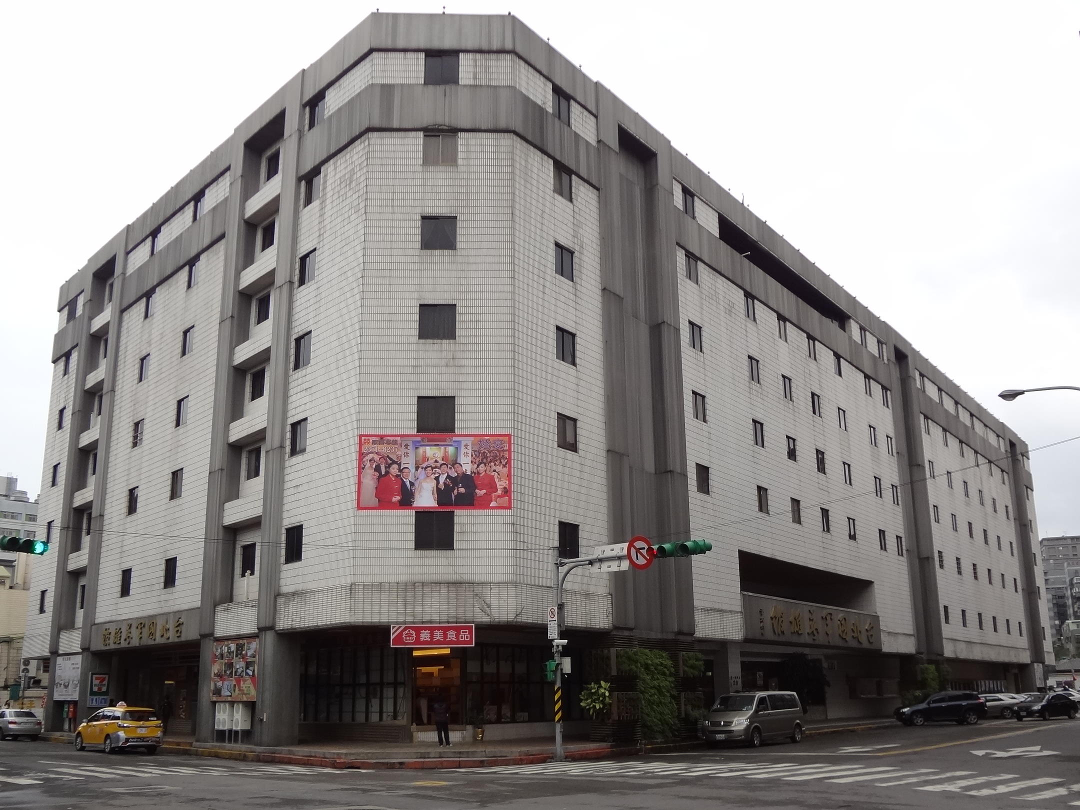 台北國軍英雄館，位於臺北市中正區長沙街一段20號。義美食品北市軍友社門市位於1樓。